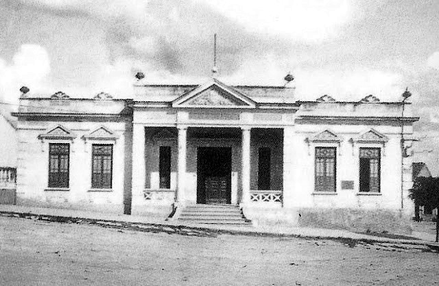 Grupo Escolar Solon de Lucena, Campina Grande, Paraíba, 1930.